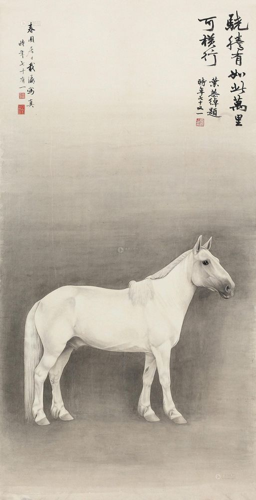 載瀛(1859-1930)以畫馬出名